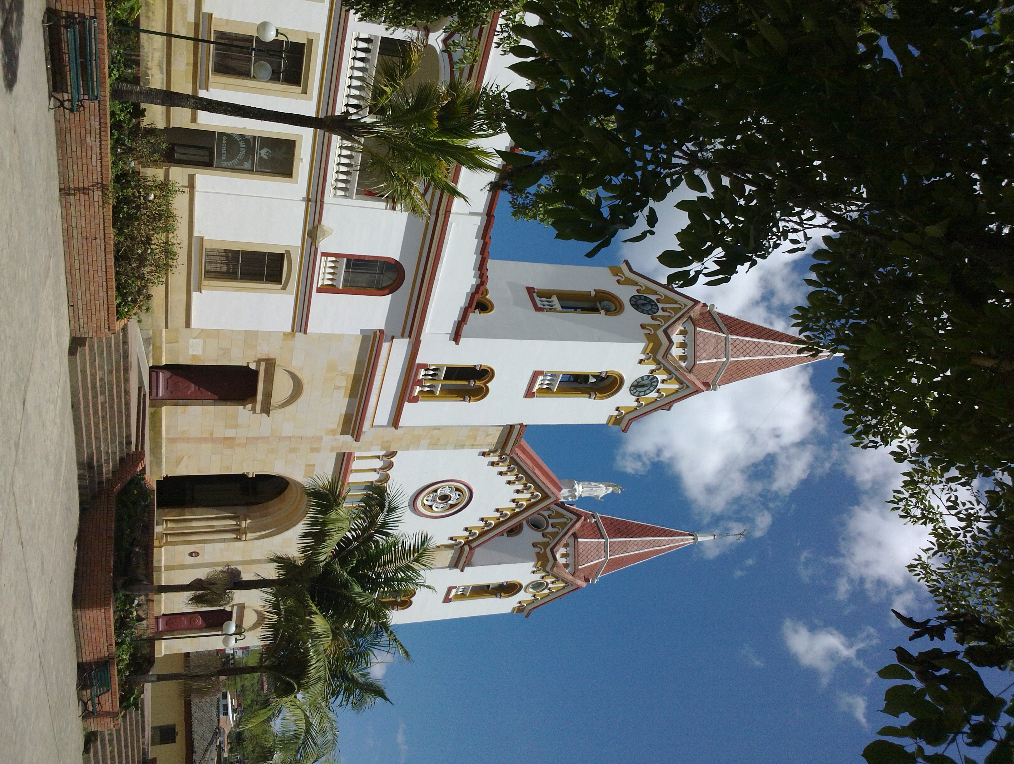 Ubicación: GACHETA, CUNDINAMARCA Iglesia de Gacheta Cundinamarca Fotografia tomada desde el parque principal, en un tibia tarde de sol.